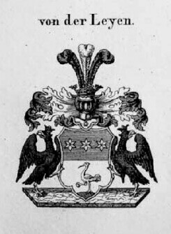 Wappen der Herren von der Leyen aus Krefeld